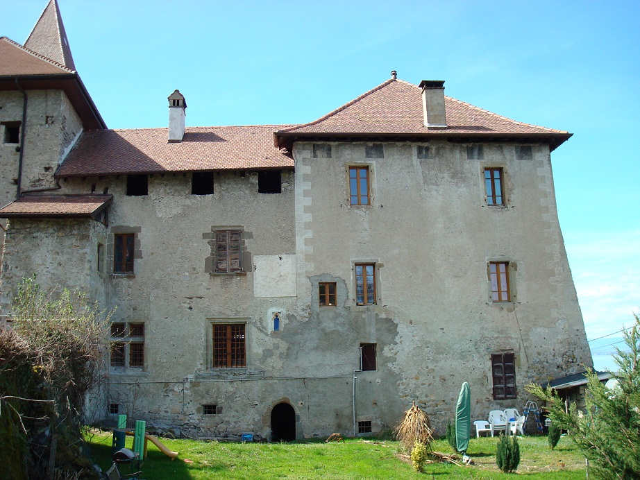 Aile nord du bâtiment conventuel